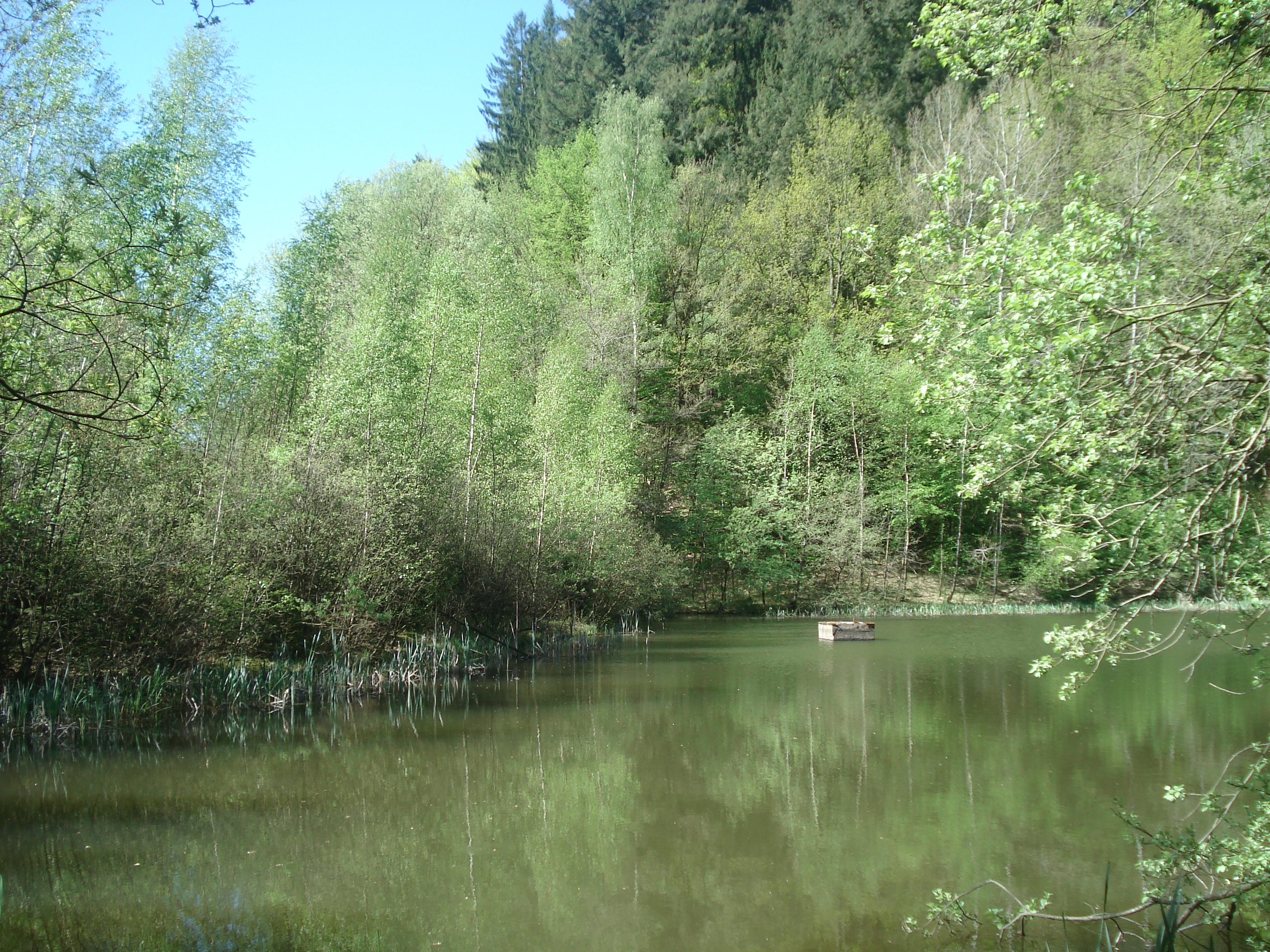 Der vom Mäusbach durchflossene Eichensee